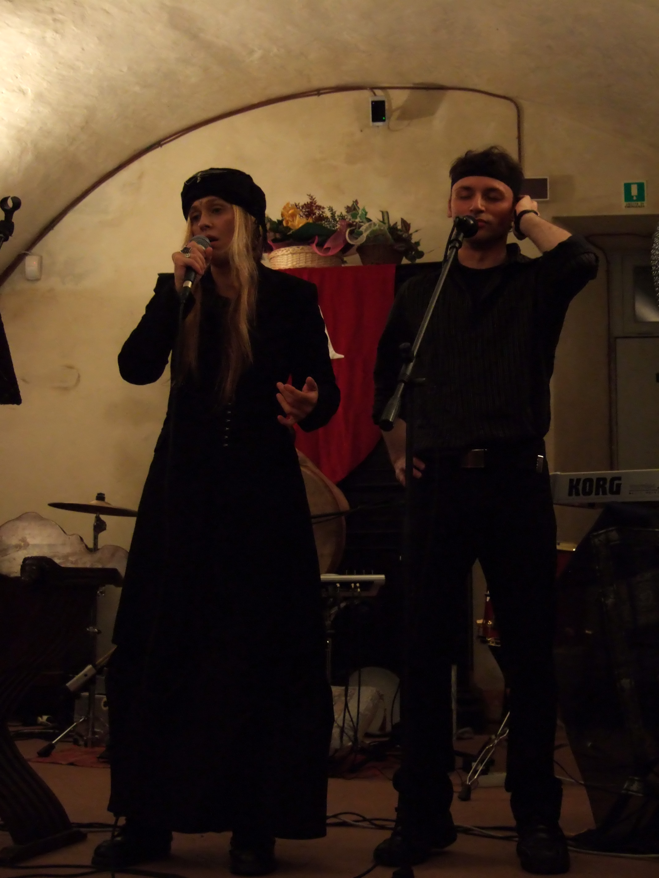 Ataraxia live at Rossena, Emilia Romagna